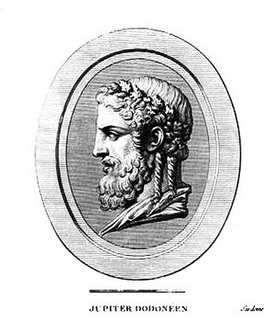 Jupiter_dodonéen